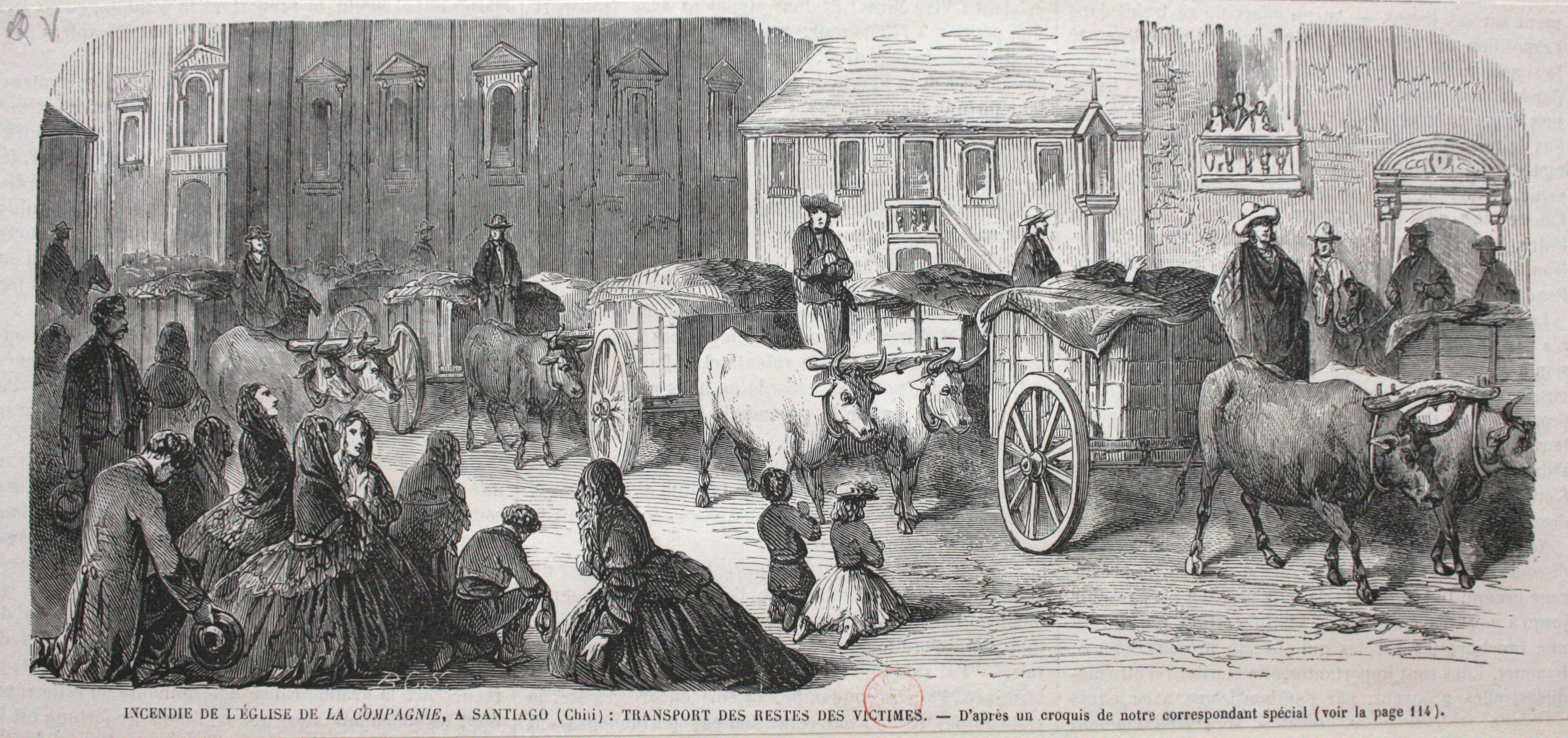 La escena describe describe el transporte de las víctimas del incendio de la Iglesia de la Compañía de Jesús en Santiago ocurrido el 8 de diciembre de 1863